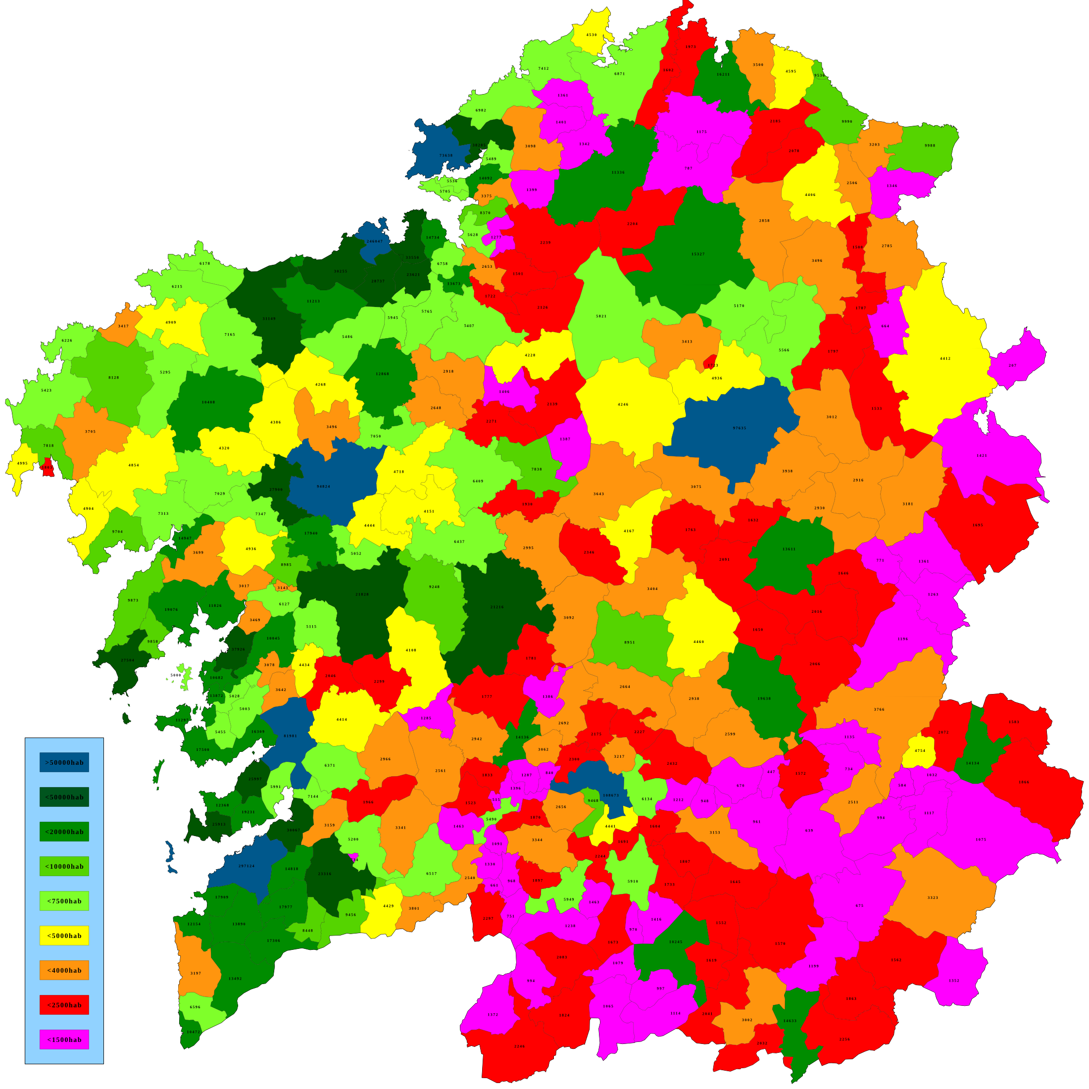 Mapa cos concellos de Galicia e a súa poboación en 2010 indicando a poboación do concello mediante cores.